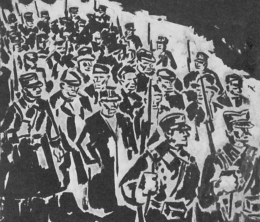 Srpskohrvatski / српскохрватски: Đorđe Andrejević Kun - logor Bileća